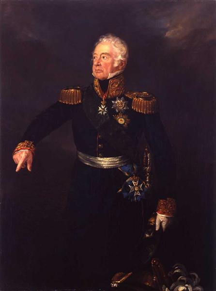 Bildnis Heinrich Adolph von Gablenz (1762-1843)